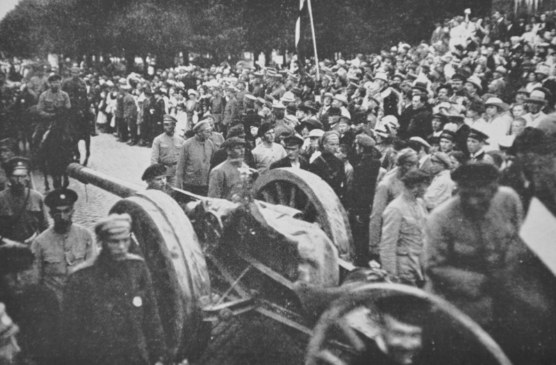 No